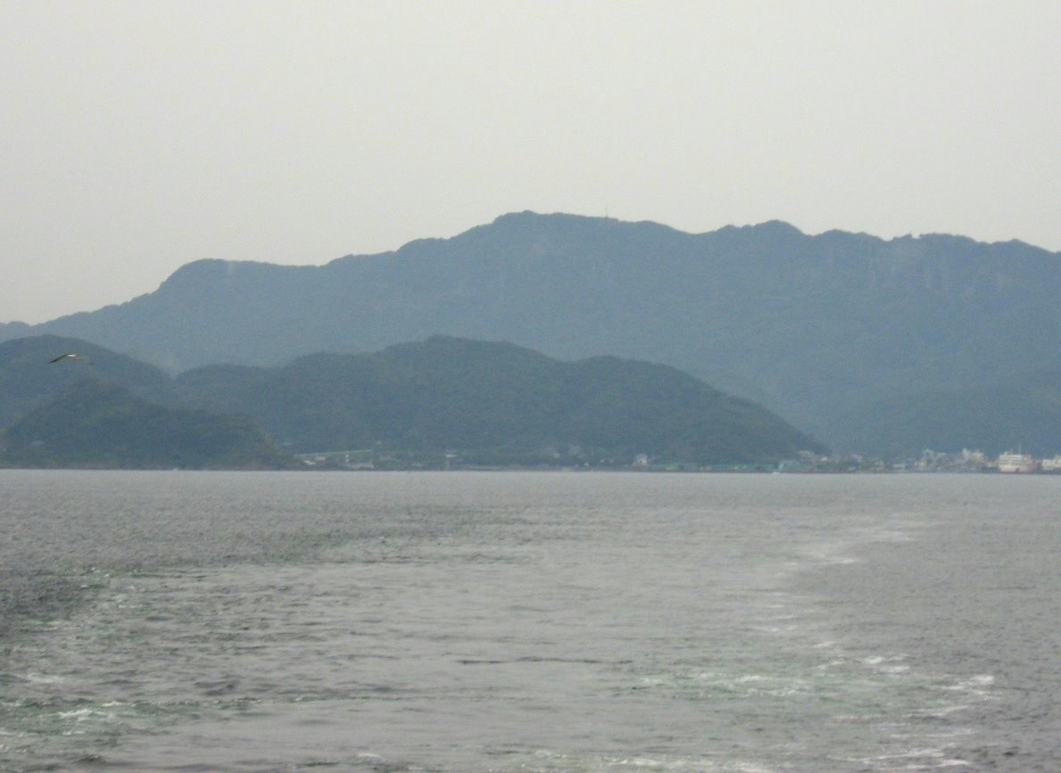 東京湾より鋸山